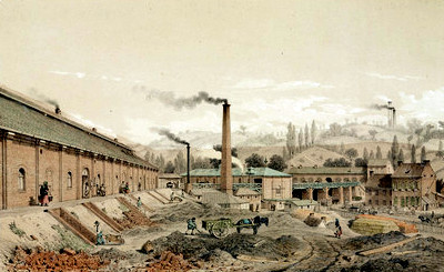 Lithograife der Zinkwerke der Vieille Montagne in Valentin Cocq